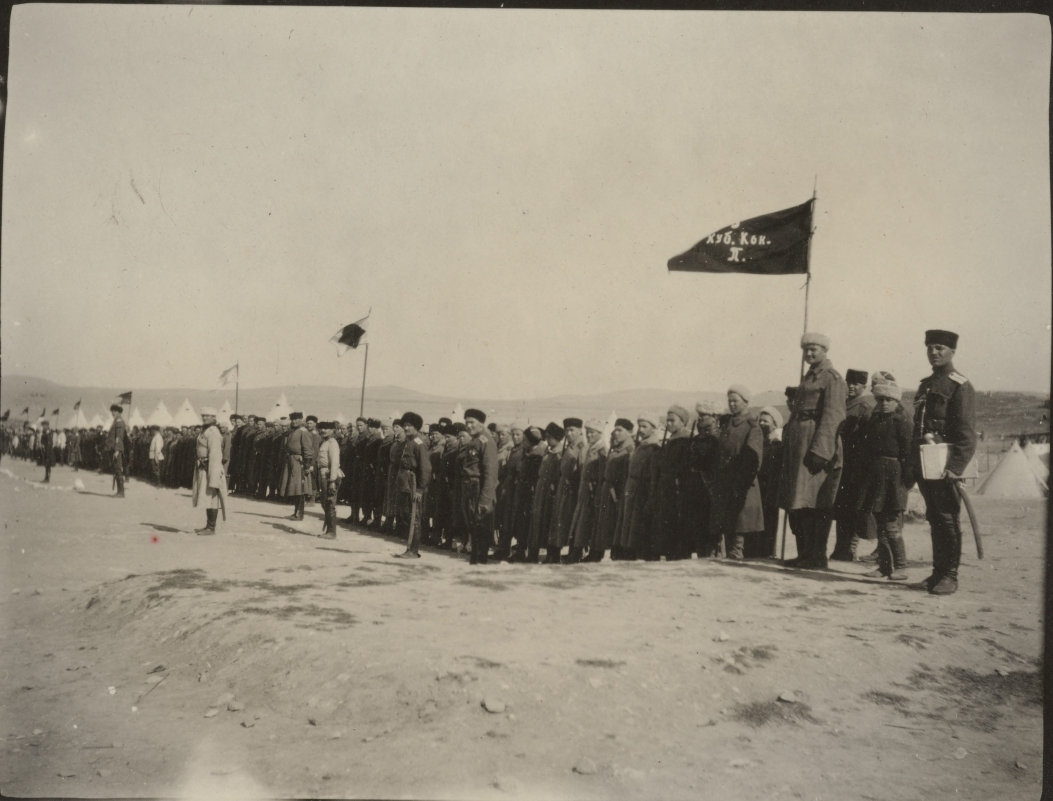 Кубанские казаки-корниловцы на Лемносе.